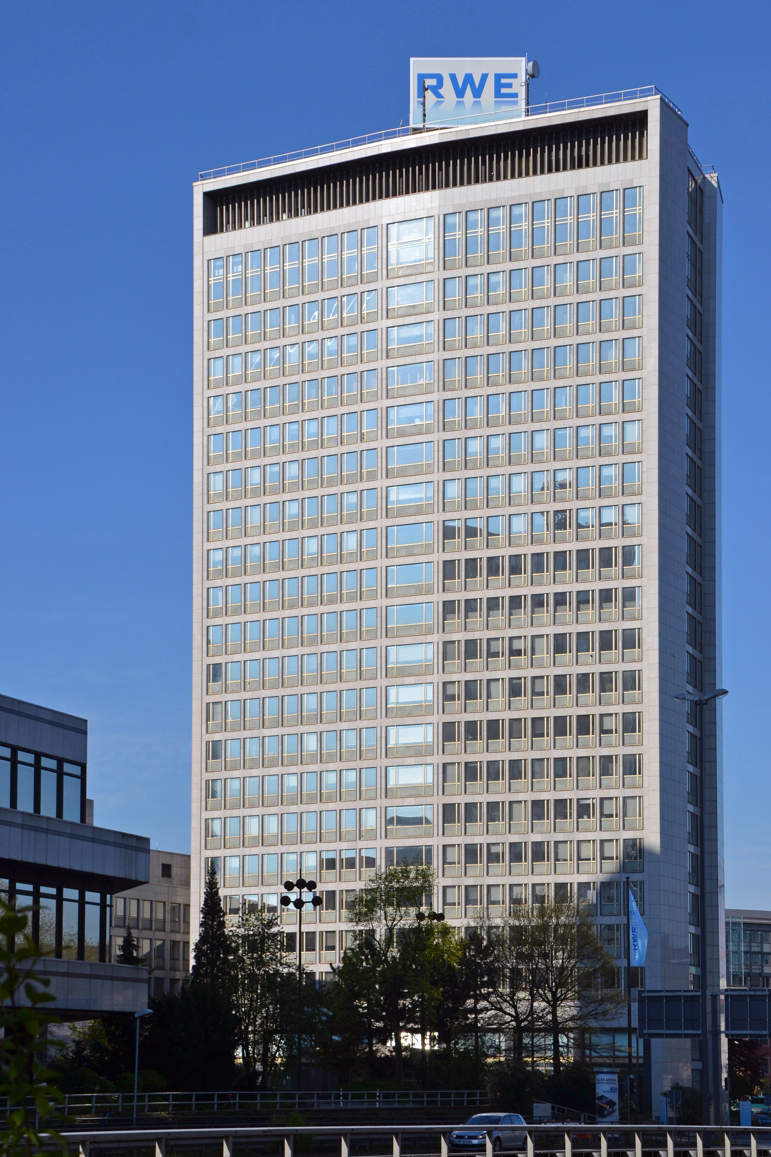 Hochhaus Kruppstraße 5, Essen-Südviertel